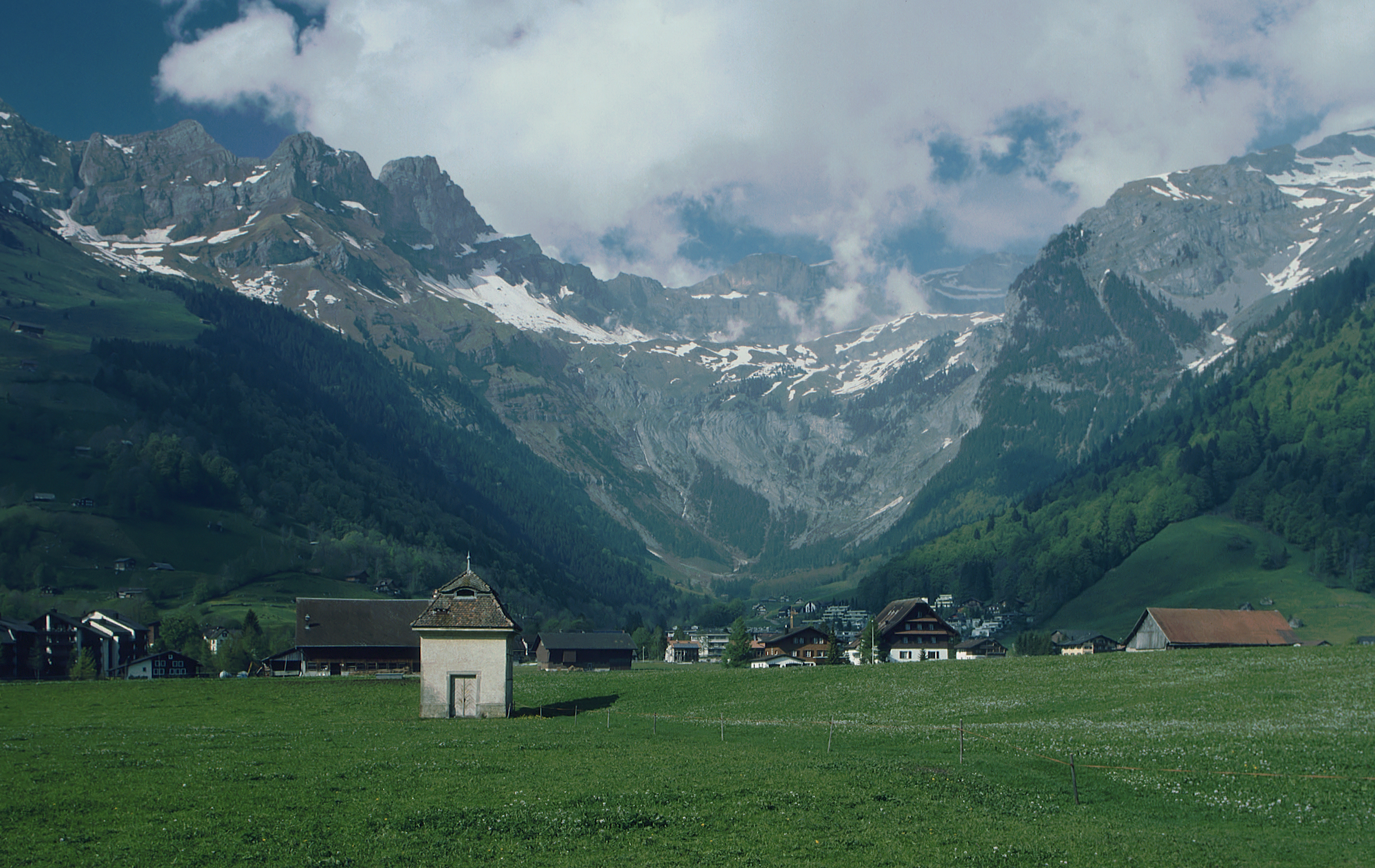 Oberes Engelbergertal - Blick in das bildhaft "Ende der Welt" genannte nördliche Nebental mit dem Ortsteil Engelberg-Horbis/Zentralschweiz